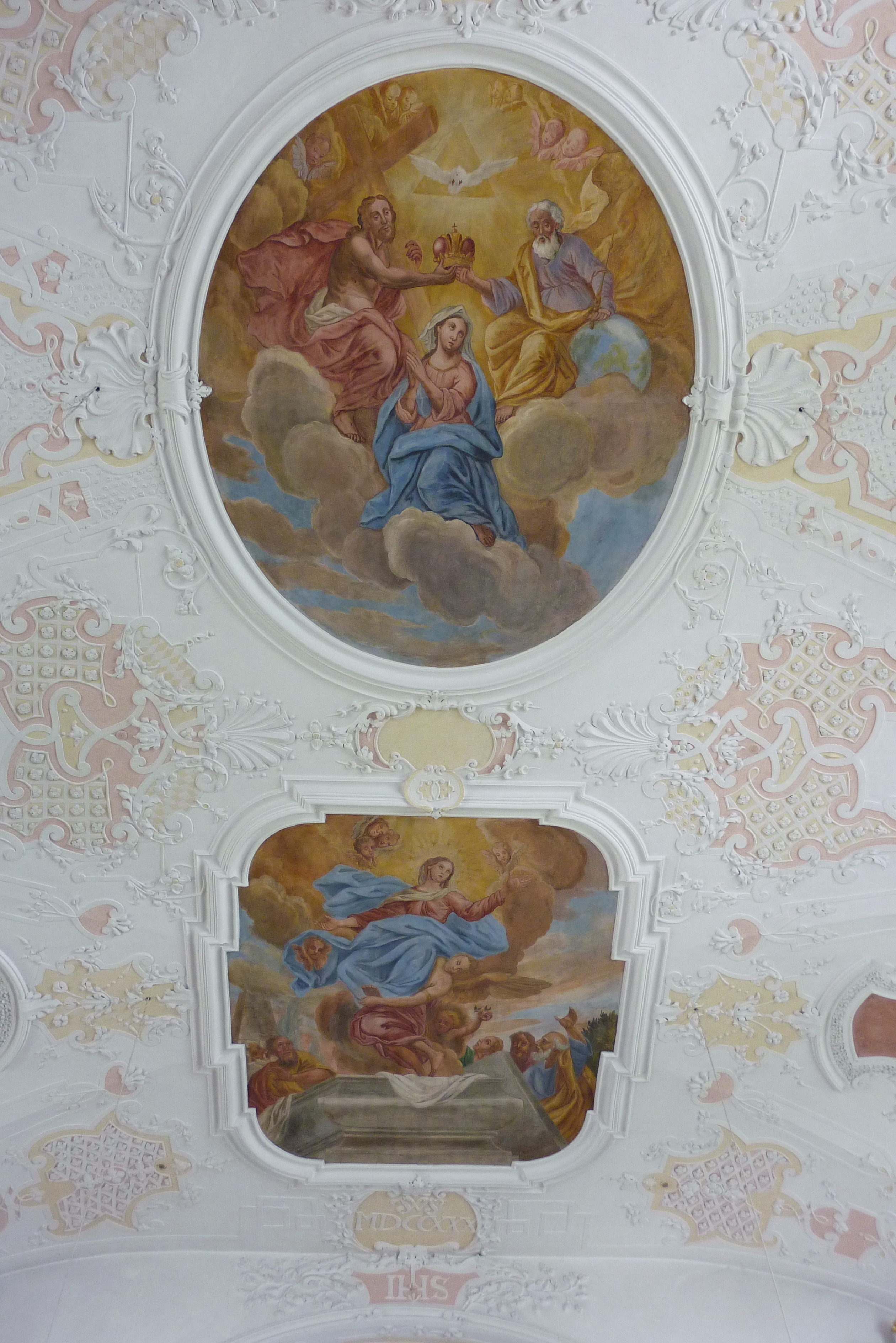 Katholische Pfarrkirche St. Maria Immaculata in Echenbrunn, einem Ortsteil von Gundelfingen im Landkreis Dillingen an der Donau (Bayern), Stuckdekor, Kartusche am Chorbogen mit Jahreszahl MDCCXXX (1730), darunter Monogramm IHS; Deckengemälde im Langhaus, Darstellung: Mariä Himmelfahrt und Krönung Mariens